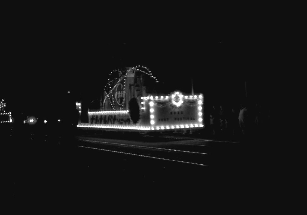 神戸市港祭り花電車（ナショナル）中山病院前